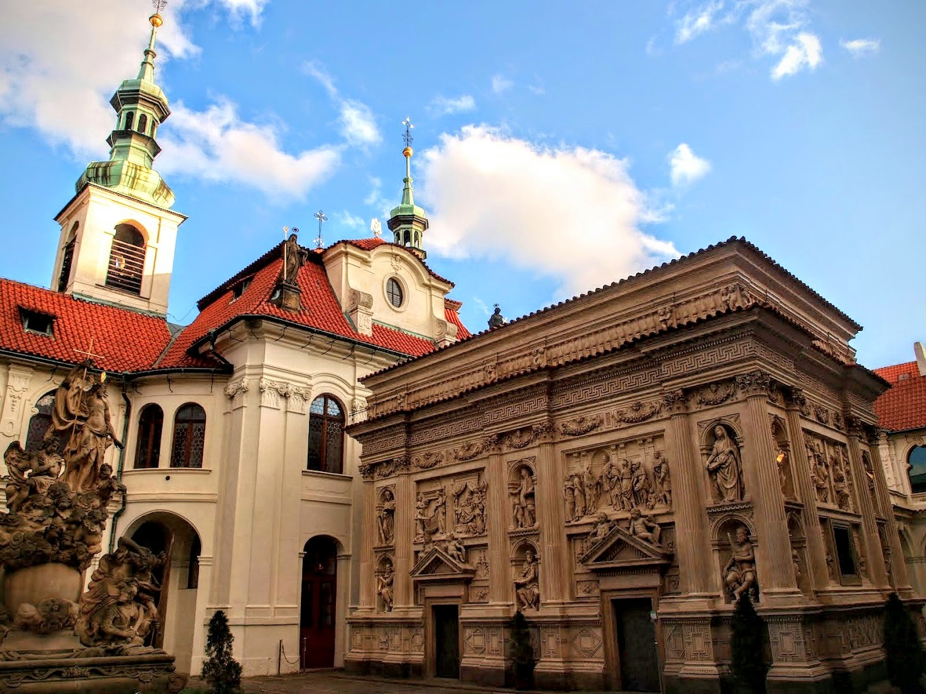 Pražská Loreta